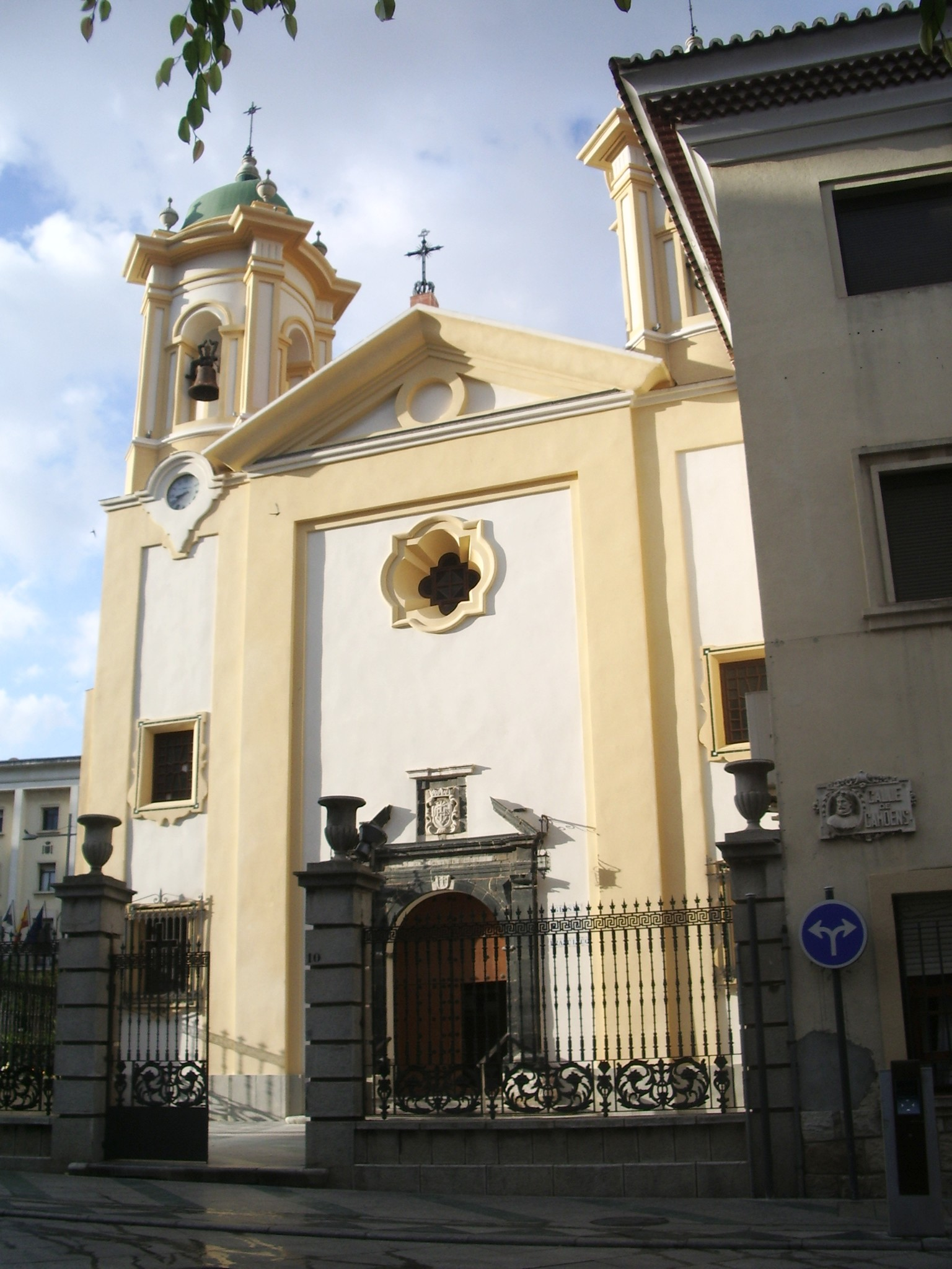 Iglesia de San Francisco en Ceuta